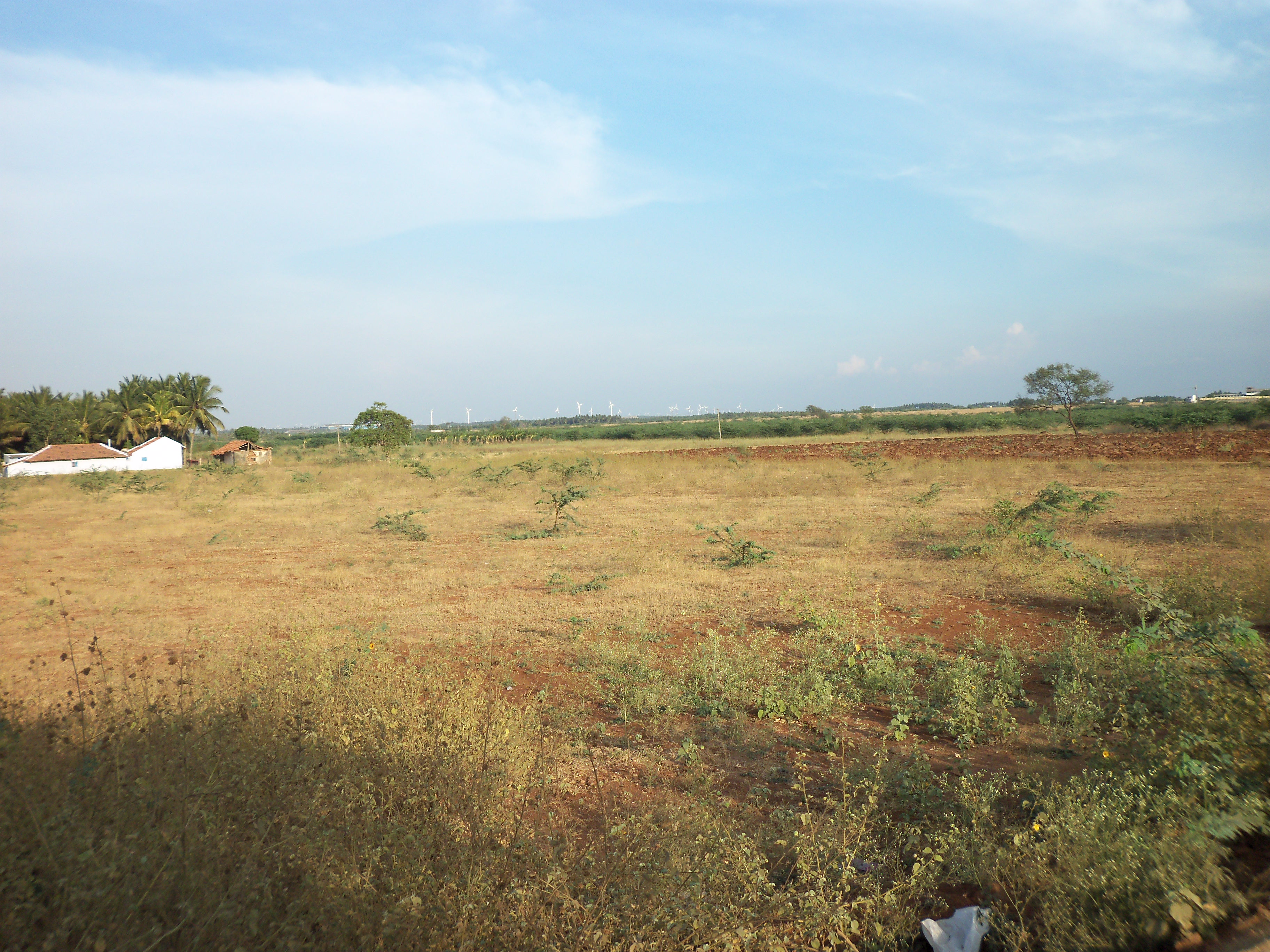 வறண்ட வேளாண் நிலம்.